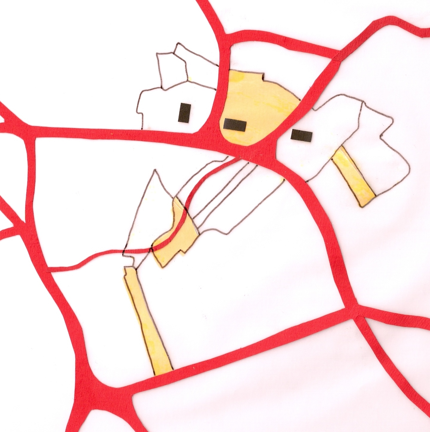 De percelen van de Plashoeve na de eerste boedelscheiding 1807